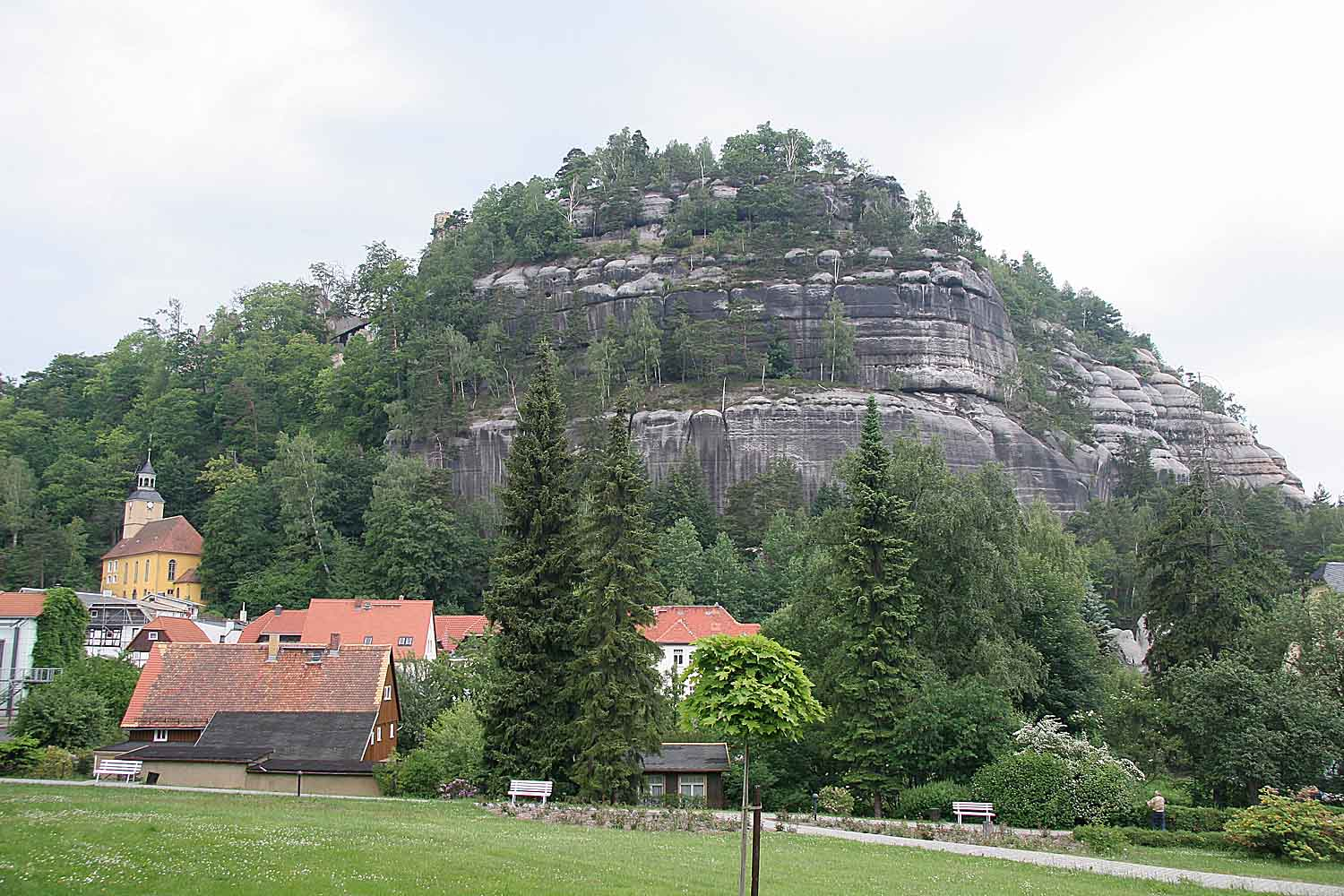 Oybin, im Südosten Sachsens, an der Grenze zu (Tschechien)